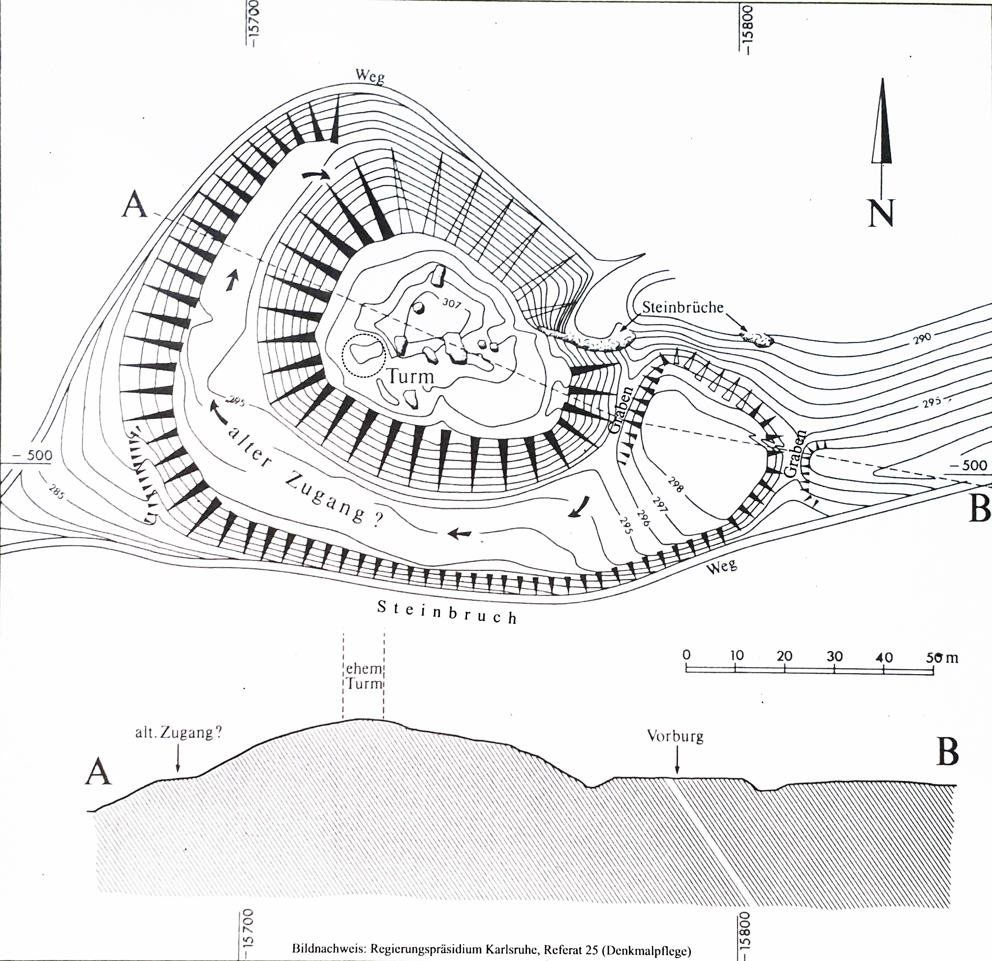 Grundriss und Seitenriss der Hirschburg, auch Burg Hirschberg genannt.